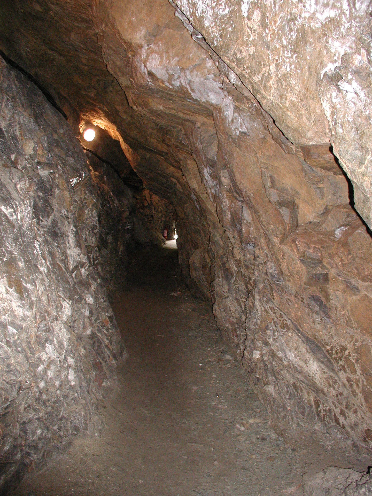 Štola sv. Josefa v Dolním Studeném - podzemní chodba